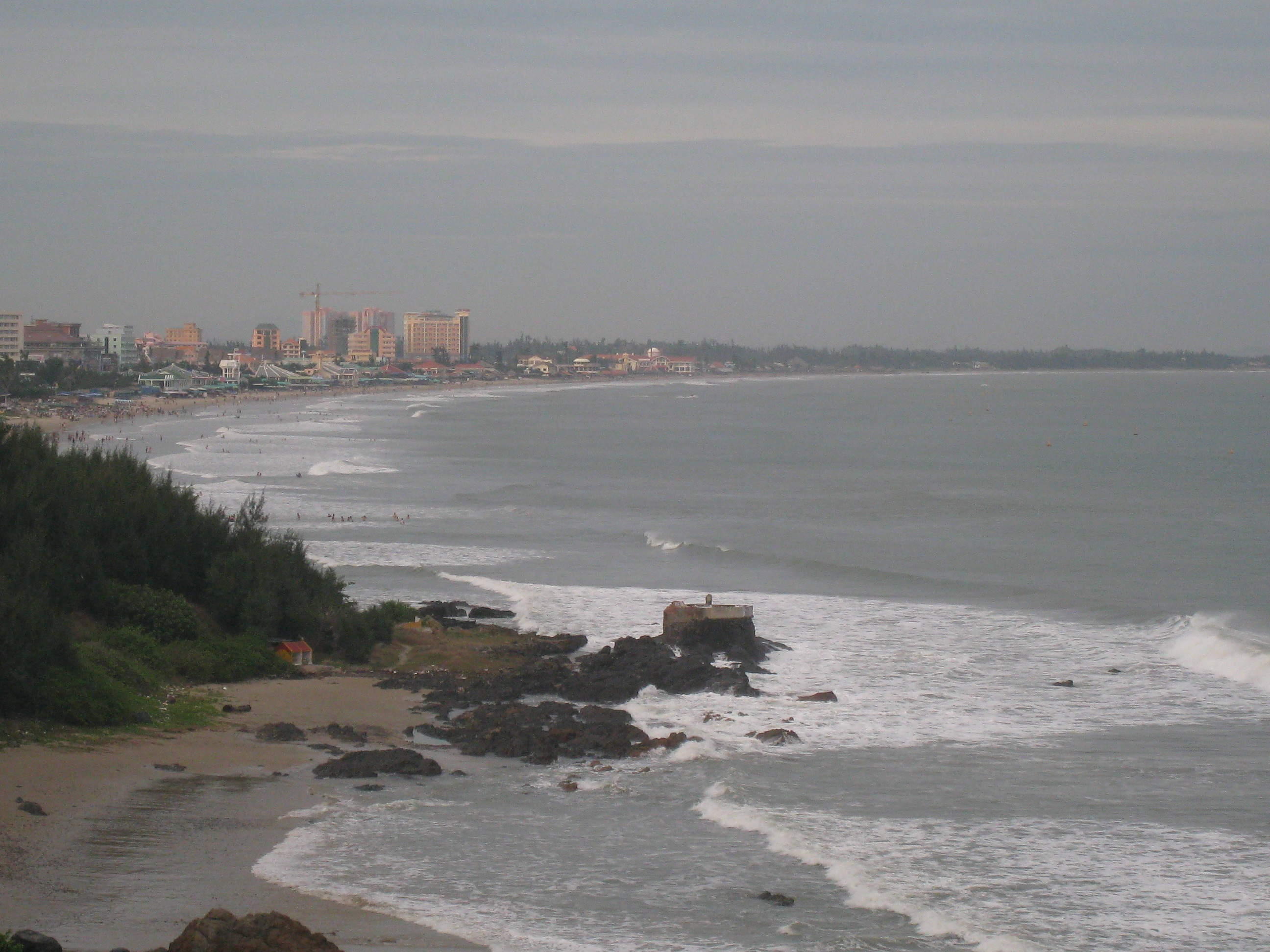 Sau Beach in Vung Tau, Vietnam